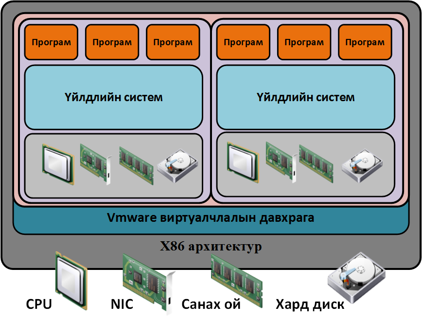 Монгол: Зураг 1 - Виртуалчлалын давхарга